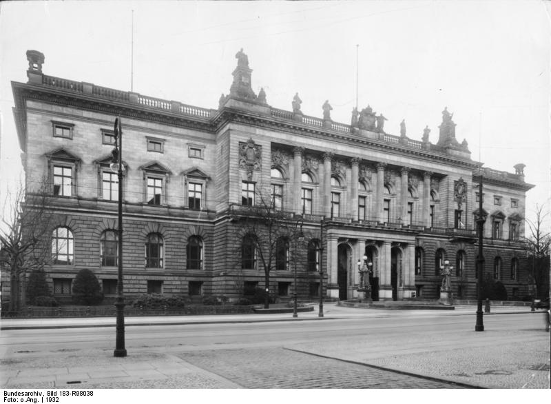 ADN-ZB-Archiv Berlin: Preußisches Angeordnetenhaus in der Prinz-Albrecht-Strasse 5. 1934 in Preußenhaus umbenannt. Vom 30.12.1918 - 1.1.1919 tagte in diesem Gebäude der Gründungskongreß der KPD. Aufnahme: 1932 [Scherl Bilderdienst] Information added by Wikimedia users.